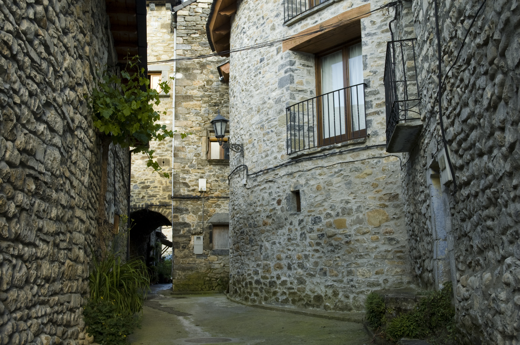 Casa Castillo, Puyarruego, Huesca, Aragón (España), Casa rural (alquiler íntegro)